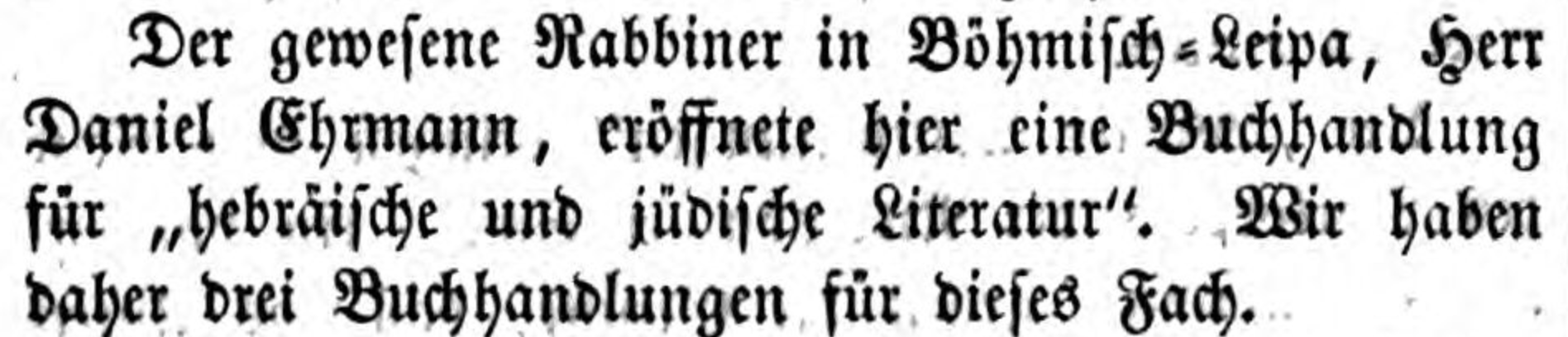 Rabín Flaschmann, bývalý rabín v České Lípě, inzeruje, že „si v Praze otevřel své vlastní nakladatelství hebrejskou a židovskou literaturou a toho čsu již tři tituly na toto téma ráčí býti dostupnými“. Prager Tagblatt, červenec 1860.